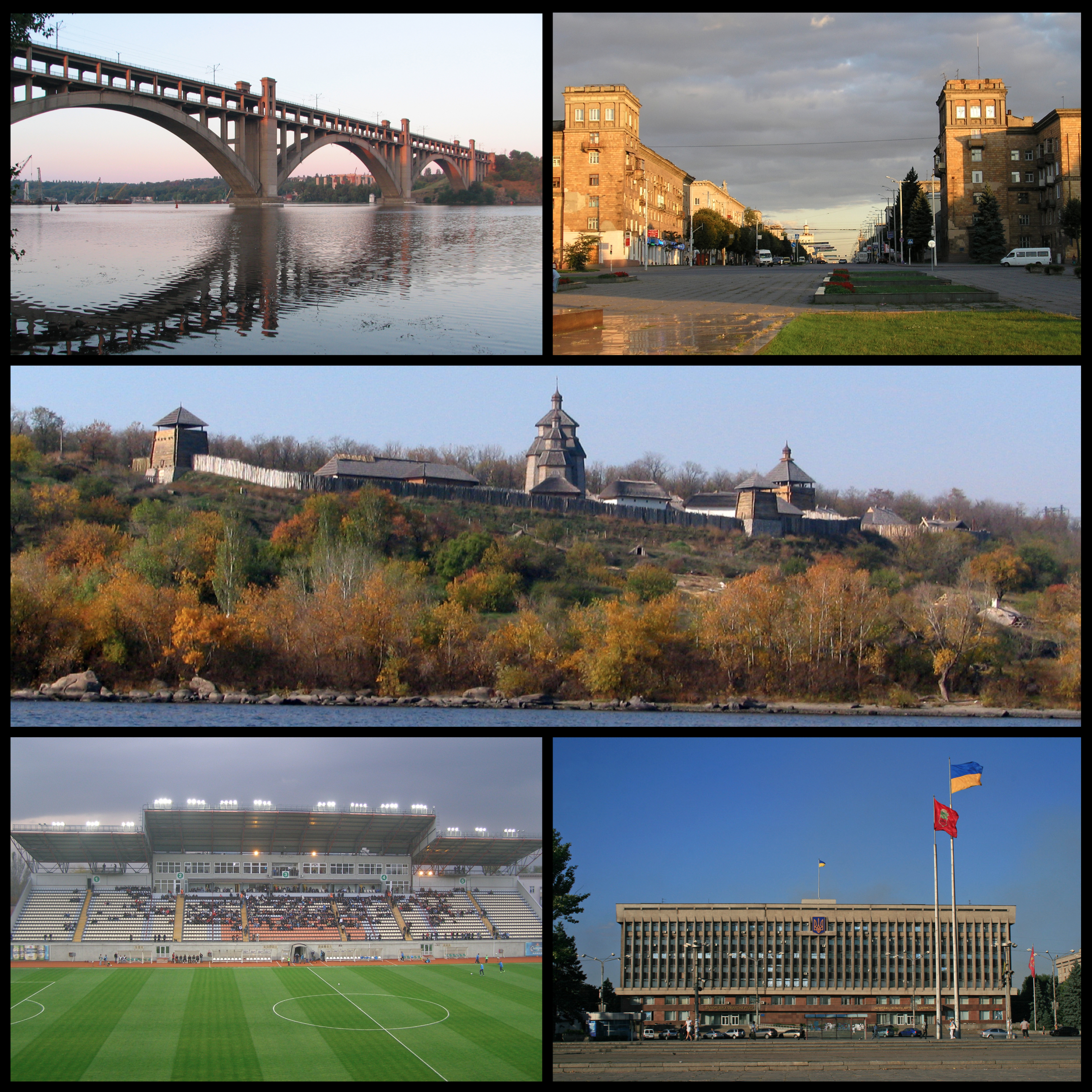 Das Bild zeigt ein paar Sehenswürdichkeiten der ukrainischen Großstadt Saporischschja. Insgesamt wurdne fünf Bilder in einem Bild dargestellt, die u.a. auch über Wikimedia Commons abgerufen werden können. Hinweis:Die gleiche Datei findet sich auch in der englischen Wikipedia unter File:Zaporizhia (collage).jpg .